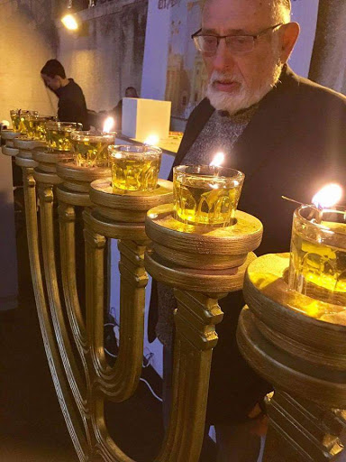 פרופ' הלל ויס מדליק נר במנורת המקדש [לצרכי תרגול] בחנוכה תשע"ז בתרגול הדלקת המנורה וחנוכת המזבח של מכון המקדש